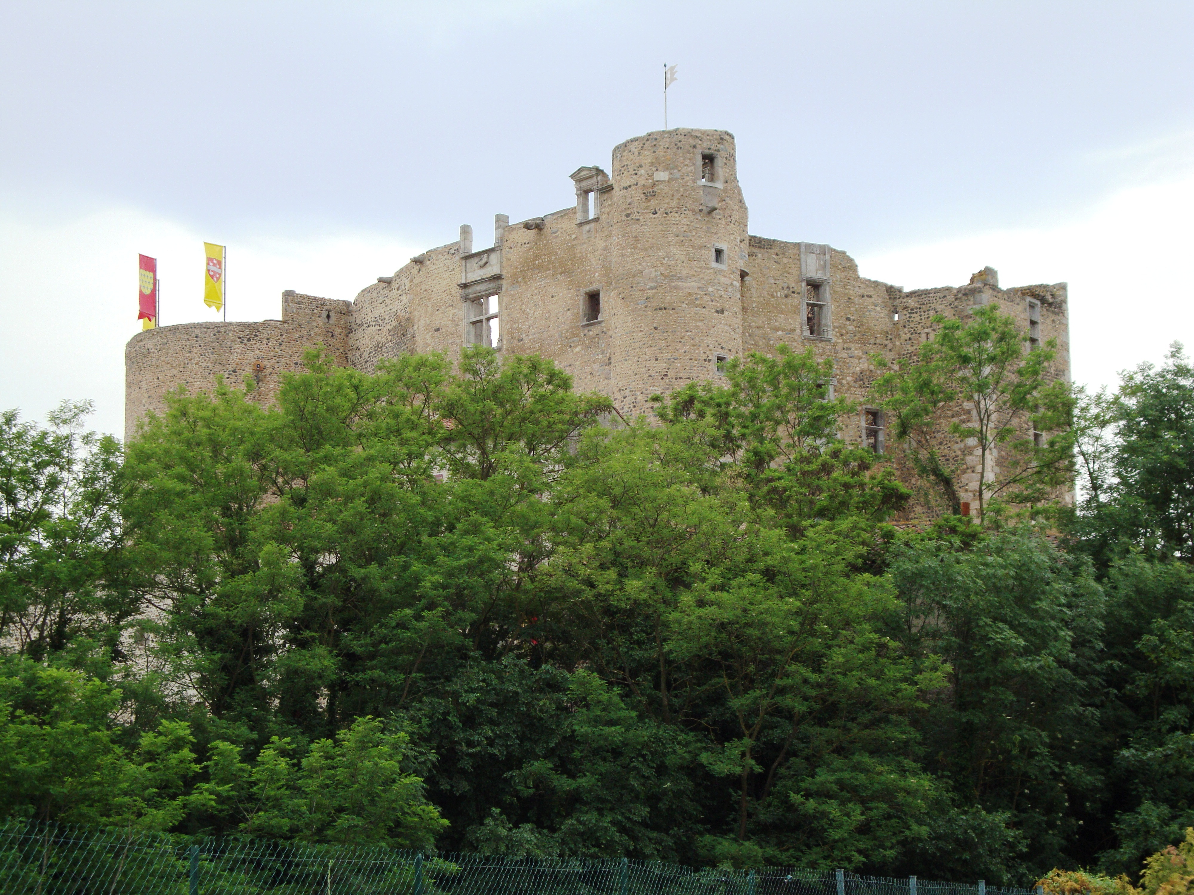 Montrond-les-Bains (Loire, Fr) château (ruine).